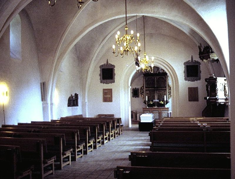 Brønshøj Kirke i Danmark. Skibet set mod øst